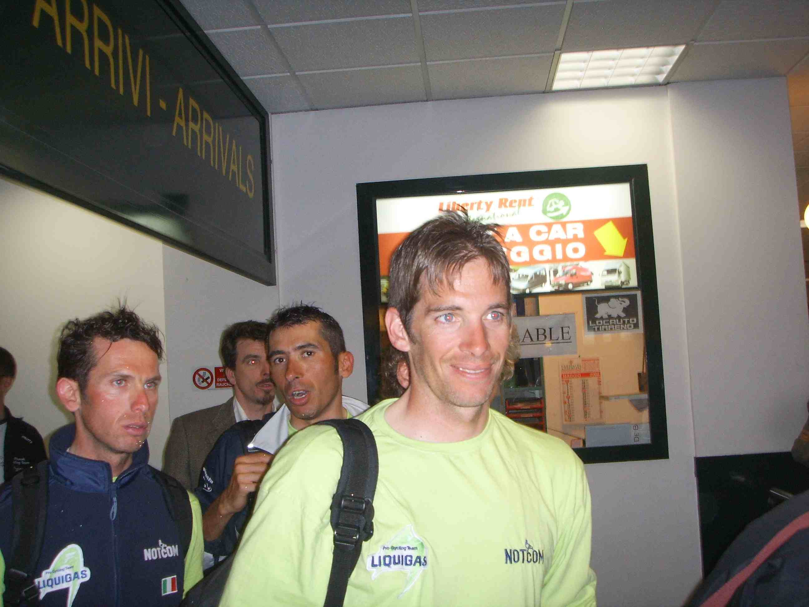 Cioni e Spezialetti "Foto scattata da me (Pepp.cristiano 12:57, 18 giu 2006 (CEST), Giuseppe Cristiano) la rilascio nel pubblico dominio